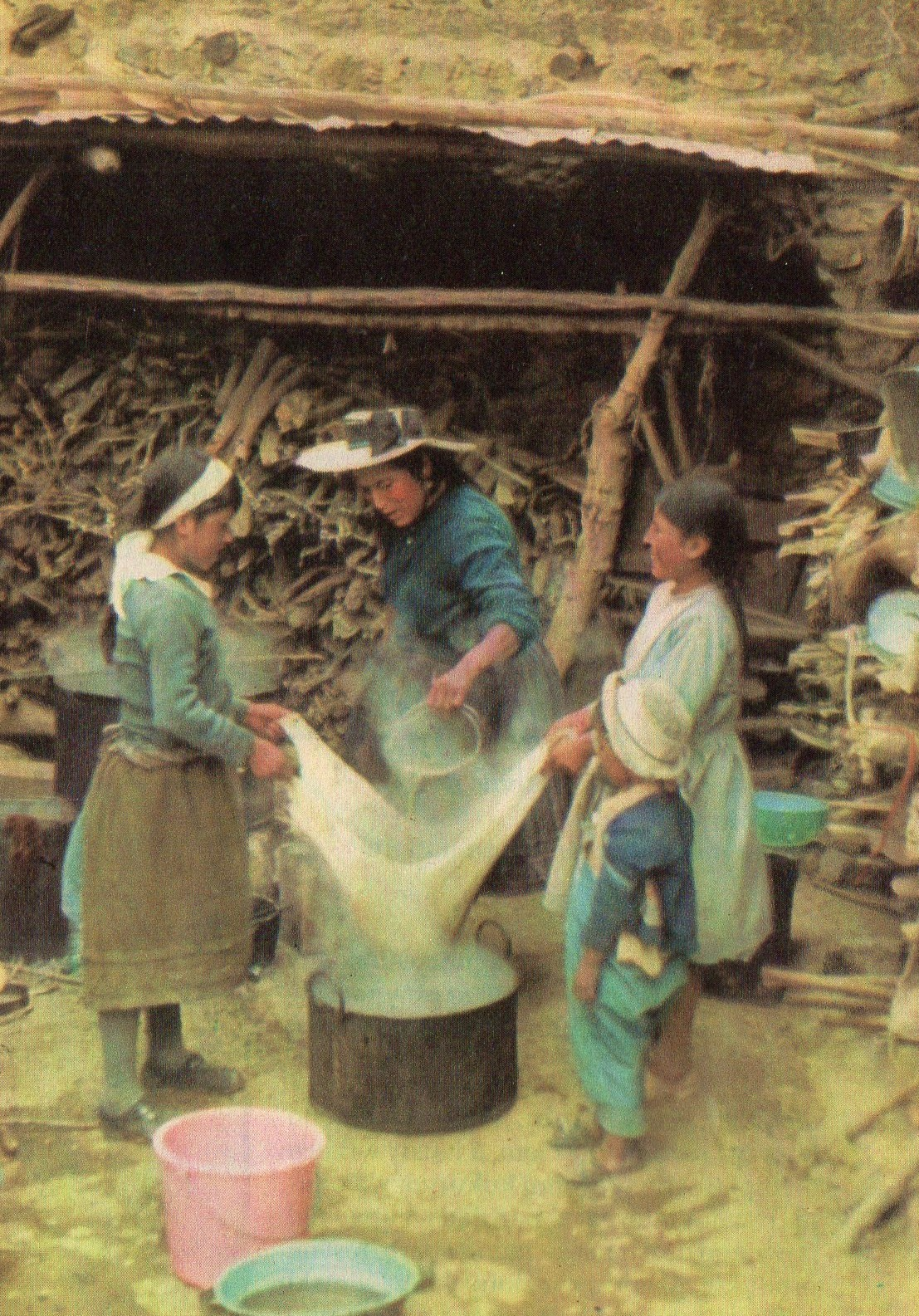 Wyrób chichy w andyjskiej wiosce Huacho sin Pescado.